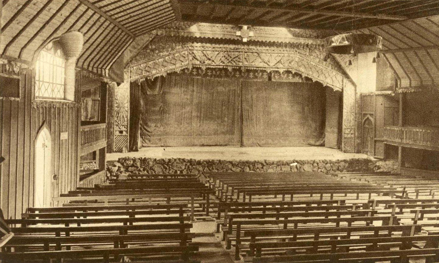 Bussang - Intérieur du théatre du peuple. Bibliothèque nationale et universitaire de Strasbourg